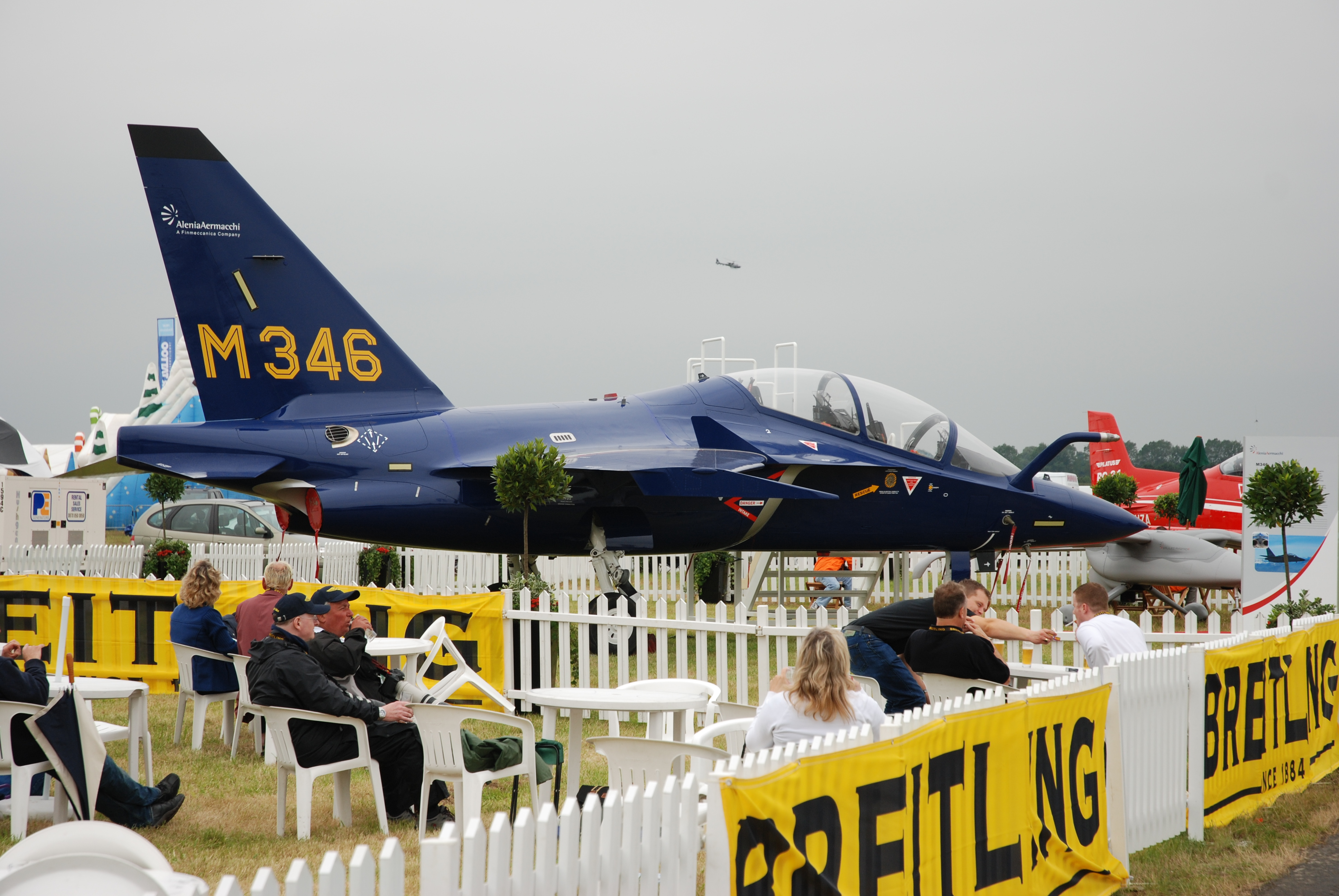 Mock up